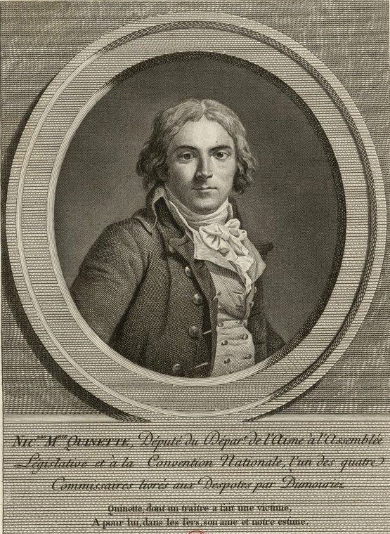 N. M. Quinette, député du département de l'Aisne à l'Assemblée législative et à la Convention Nationale